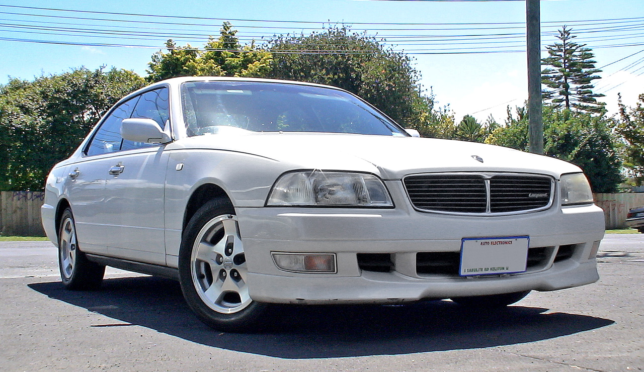 Nissan Leopard (JY33)